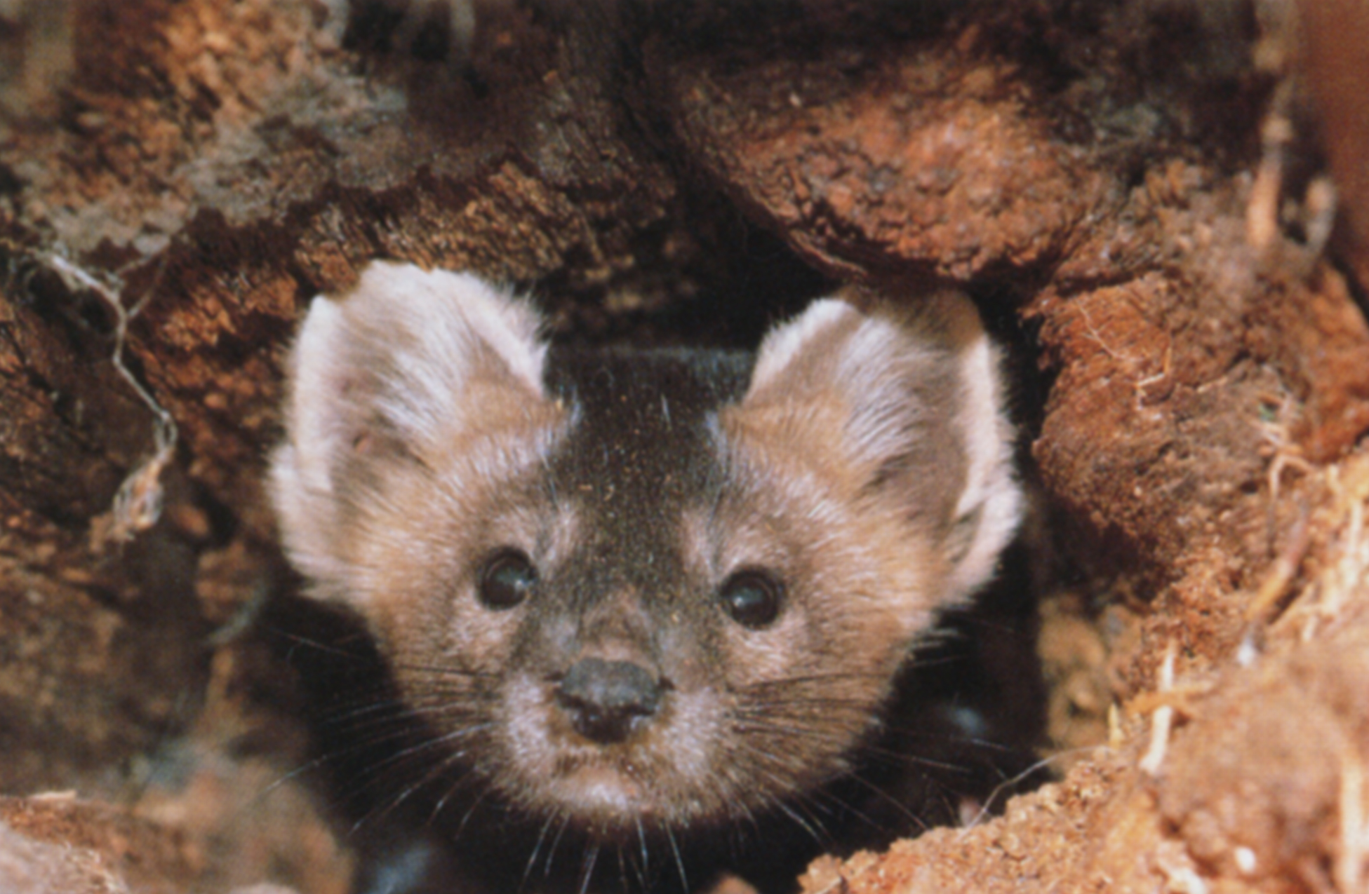 Zibellino del Barguzin